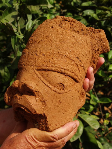 Lebensgroßer Kopf einer Nokfigur, Nigeria